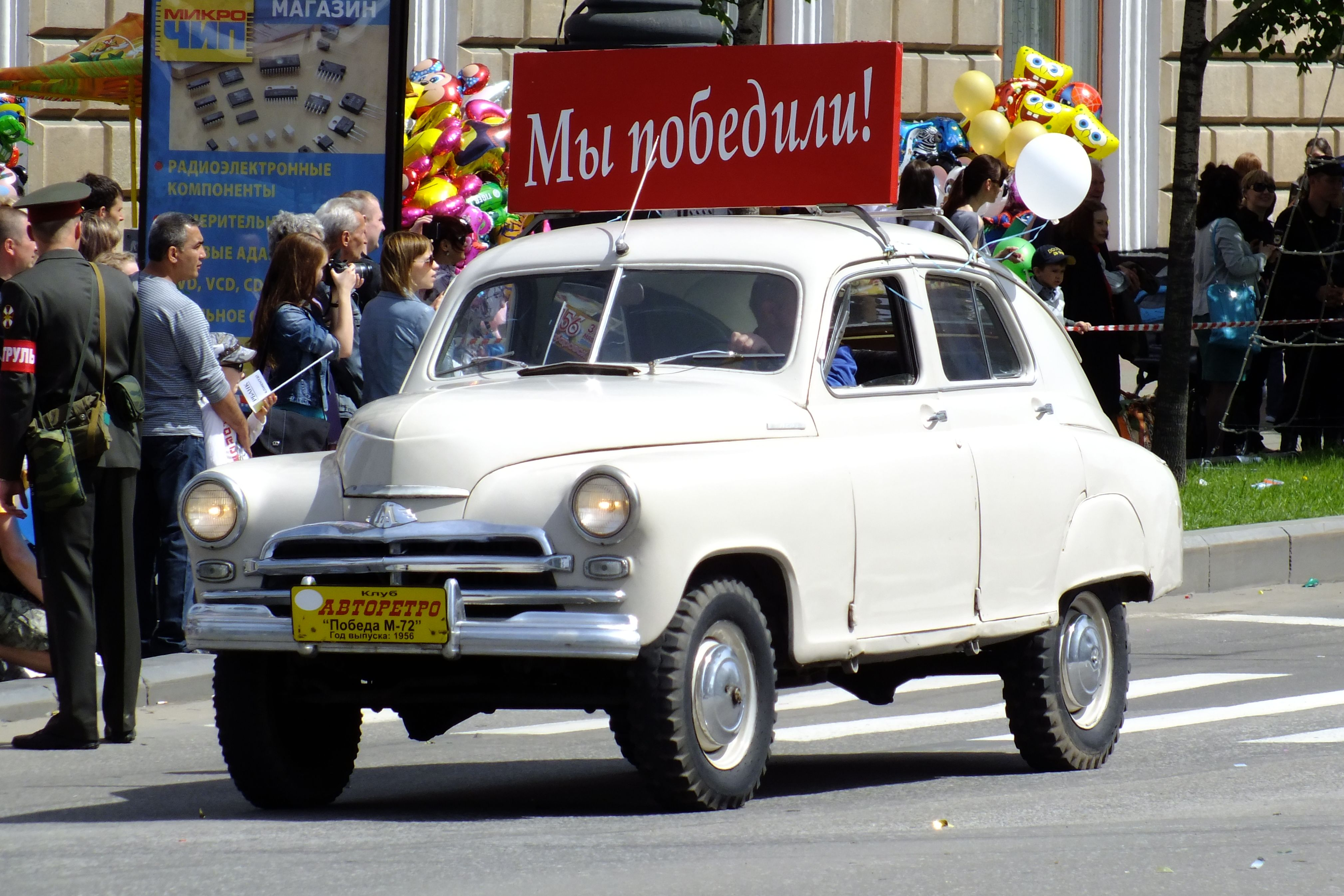 GAZ-M-72